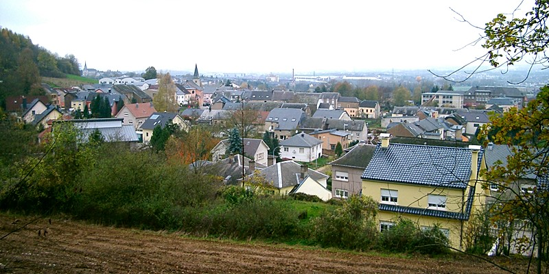 Le village luxembourgeois de Lamadelaine